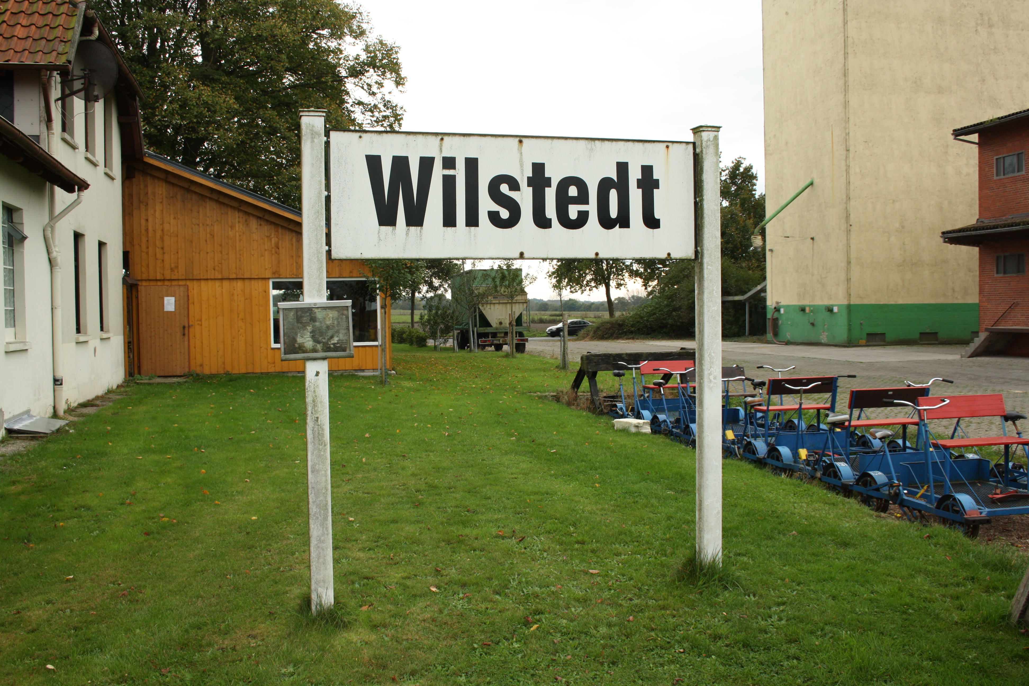 Draisinen am Bahnhof Wilstedt